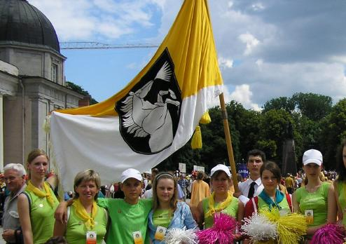 radviliškio veliavos foto nuotrauka